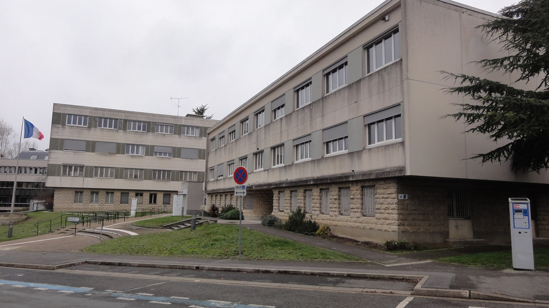 Préfecture de Beauvais